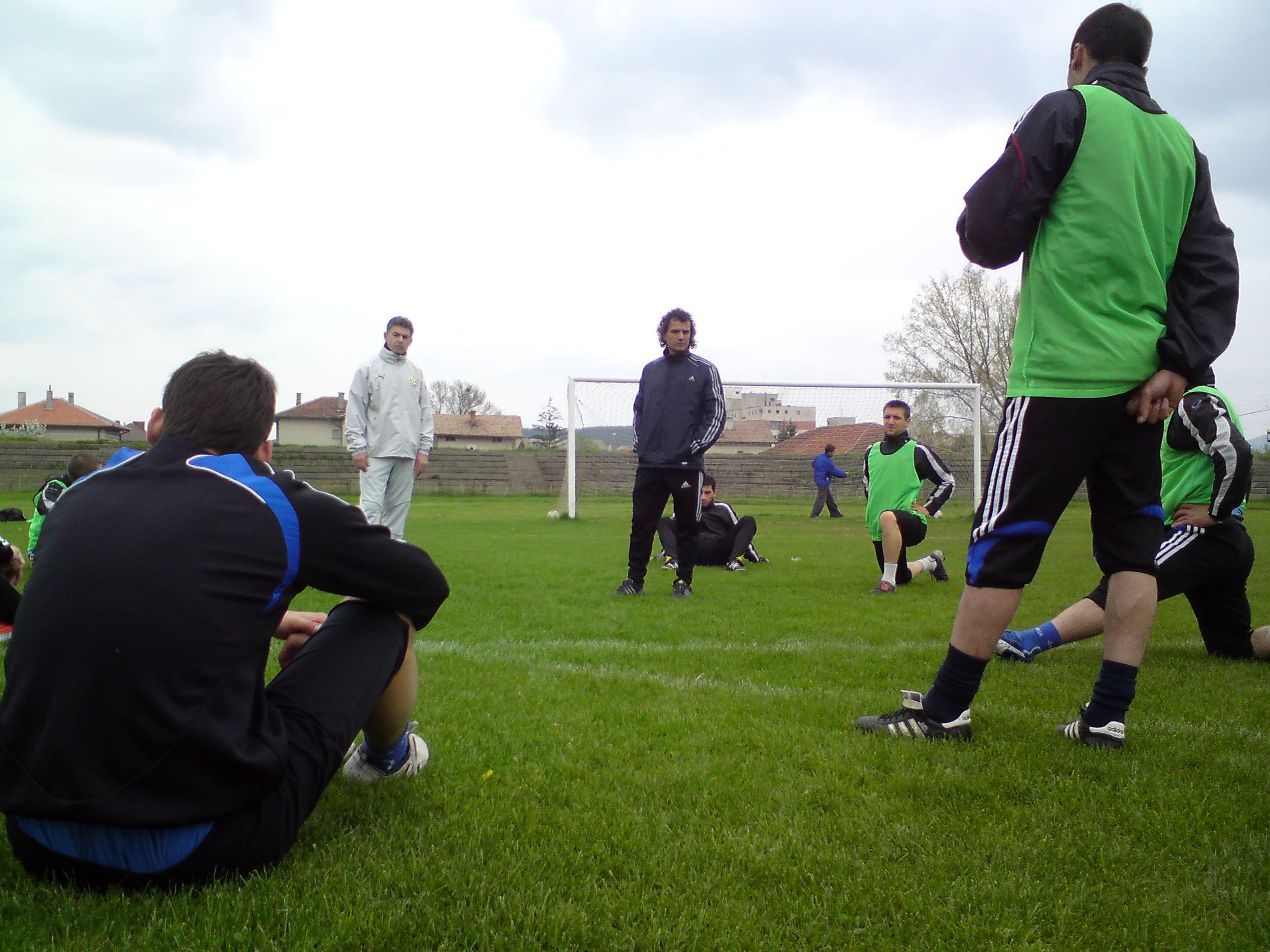 Тренировка на Сливнишки герой